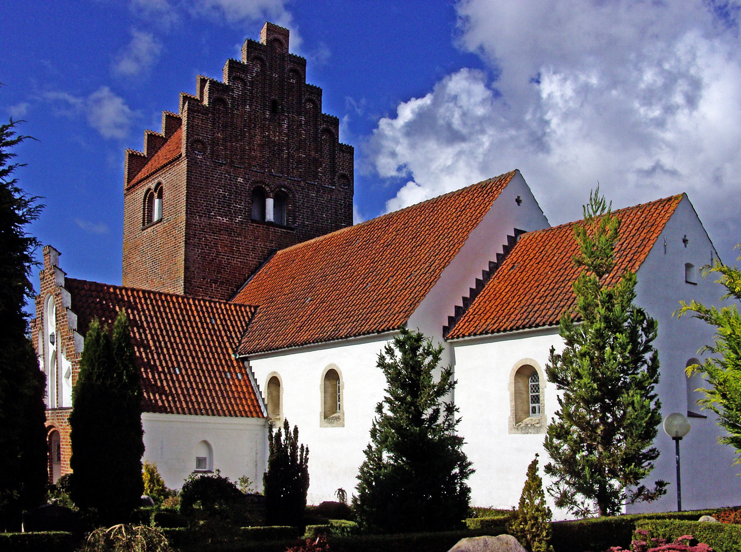 Søften kirke, Favrskov, fra sydøst